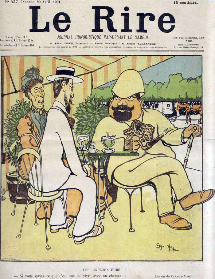 Titre : "Les Explorateurs" Légende : "Si vous saviez ce que c'est que de vivre avec un chameau ..." Cartoon from "Le Rire" by Caran d'Ache : "Les Explorateurs" ("The Explorers")